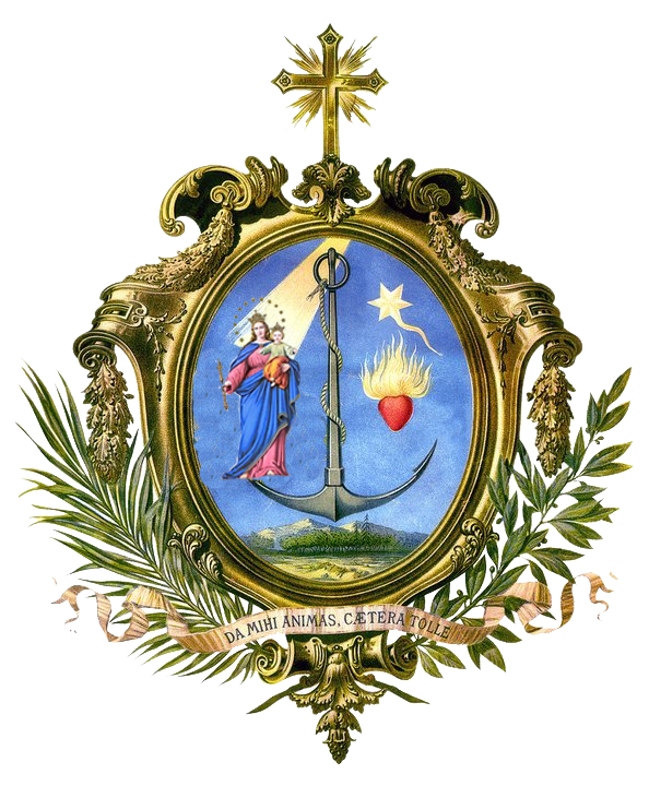 Escudo utilizado para la identificación de la congragación, bastante similar a el utilizado por la Sociedad de San Francisco de Sales (Salesianos)